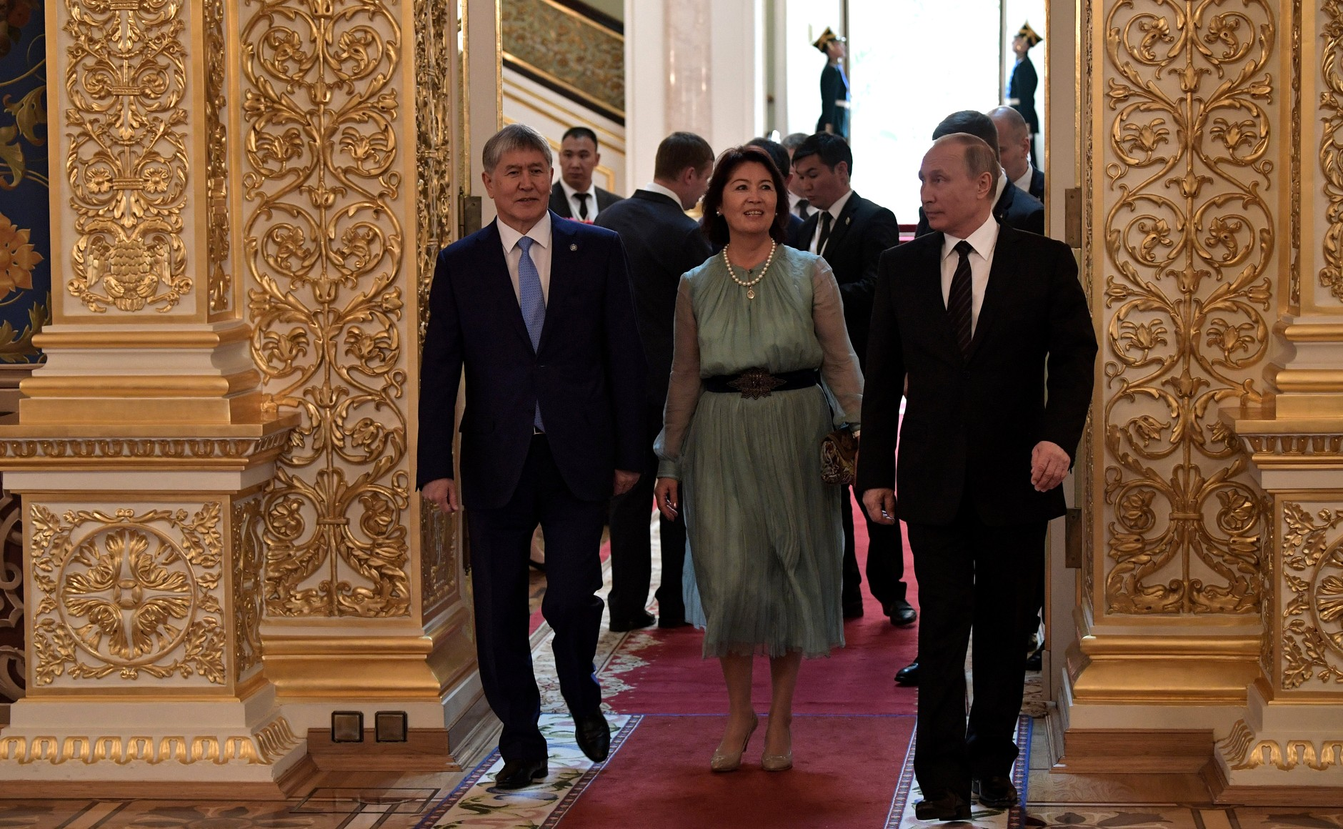 Перед началом государственного обеда от имени Президента России Владимира Путина в честь Президента Киргизии Алмазбека Атамбаева и Раисы Атамбаевой